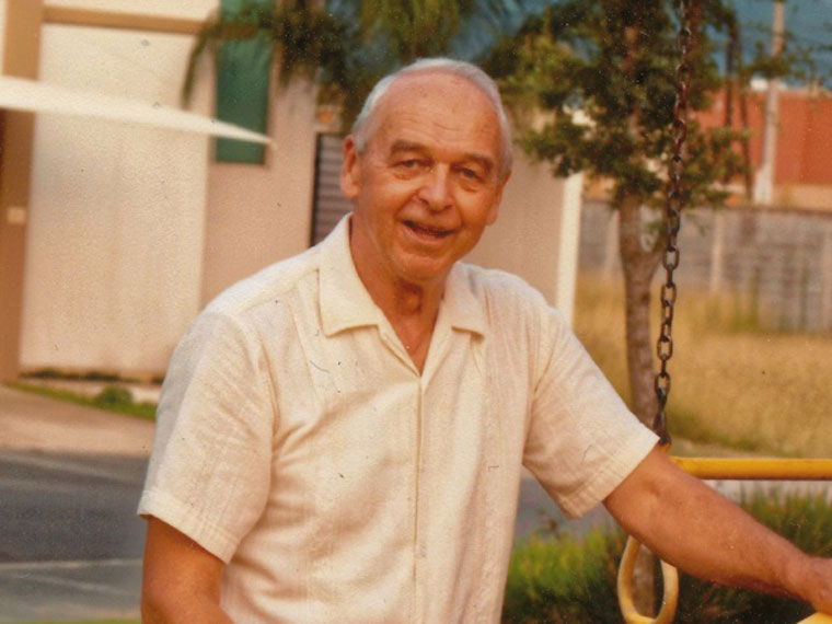 Zygmunt Haduch